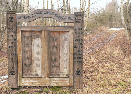 Gedenktafel für 80 im Jahre 1943 nach Auschwitz deportierte Sinti aus einem Lager im Altwarmbüchener Moor